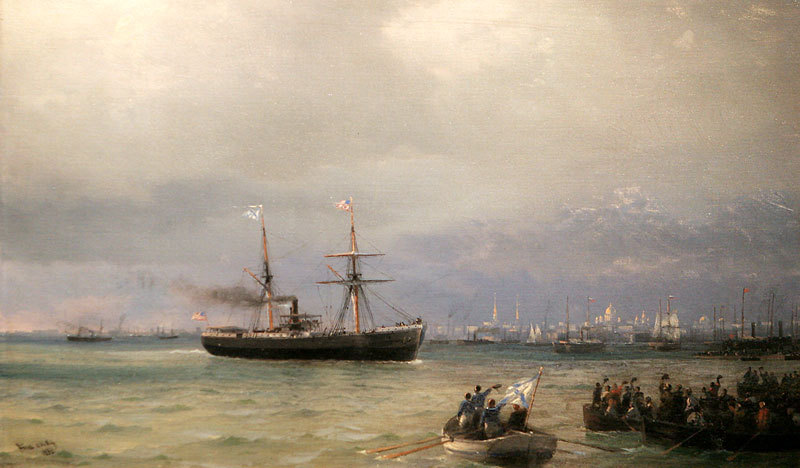 Корабель допомоги